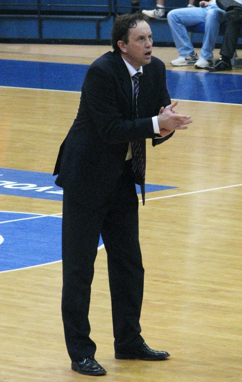 Danijel Jusup